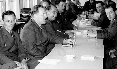 55 engagierte Soldaten sind es, die am 14. Juli 1956 im Wirtschaftsgebäude 4 der Kaserne in Munster-Lager zusammenkommen und den Deutschen BundeswehrVerband (DBwV) gründen.